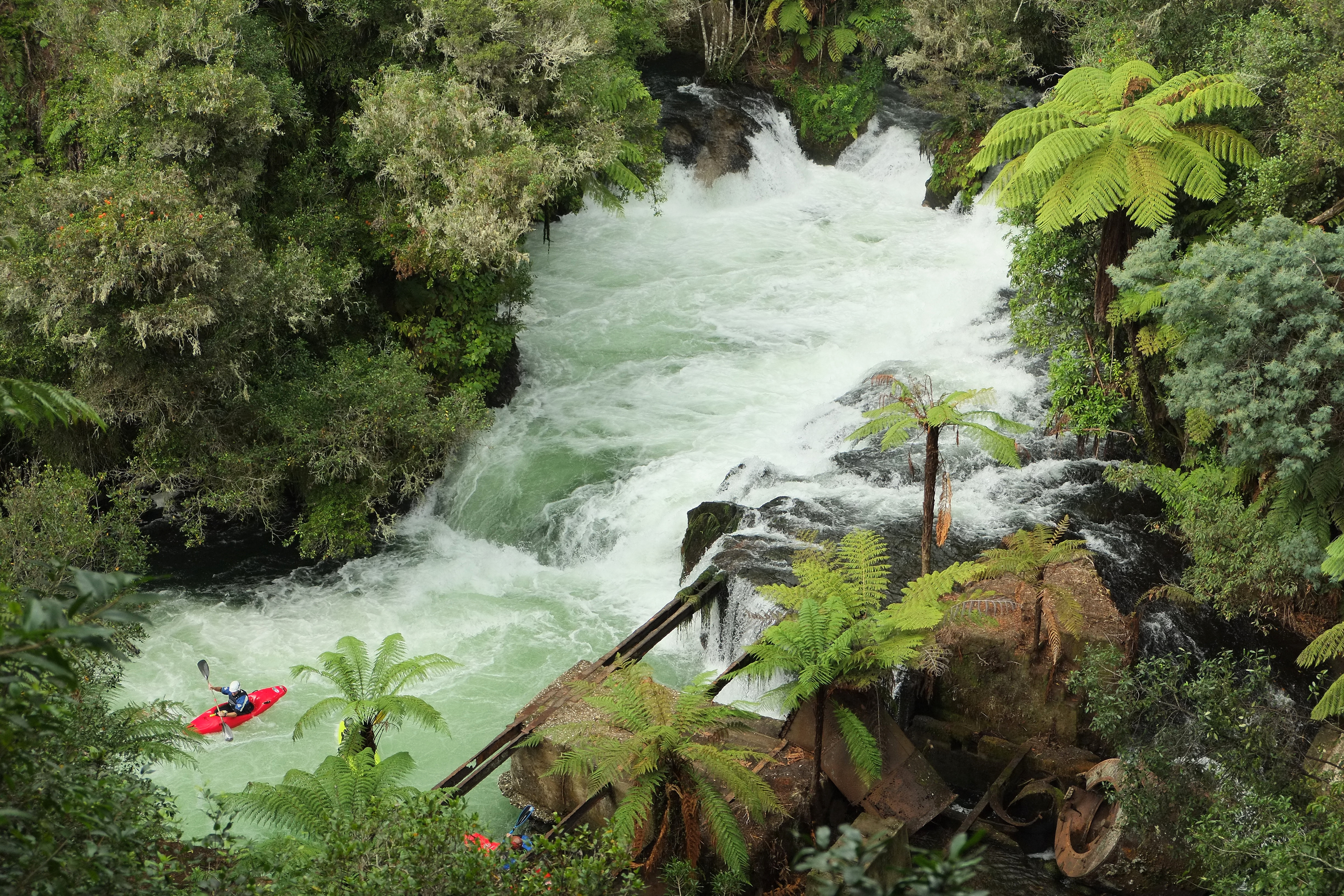 Kayakers at Okere Falls (Kaituna River)